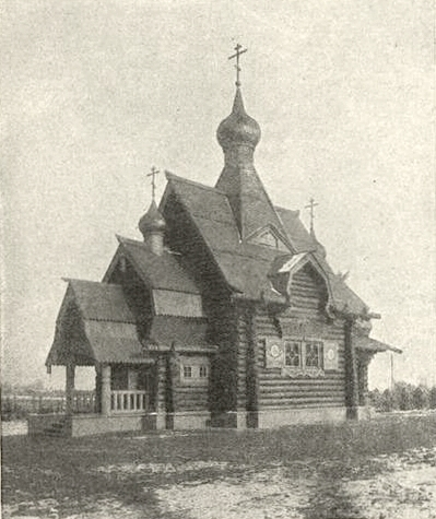 Временная церковь на братском кладбище в Царском Селе, освященная 4 октября 1915. Автор проекта и строитель храма гражданский инженер С. Ю. Сидорчук.